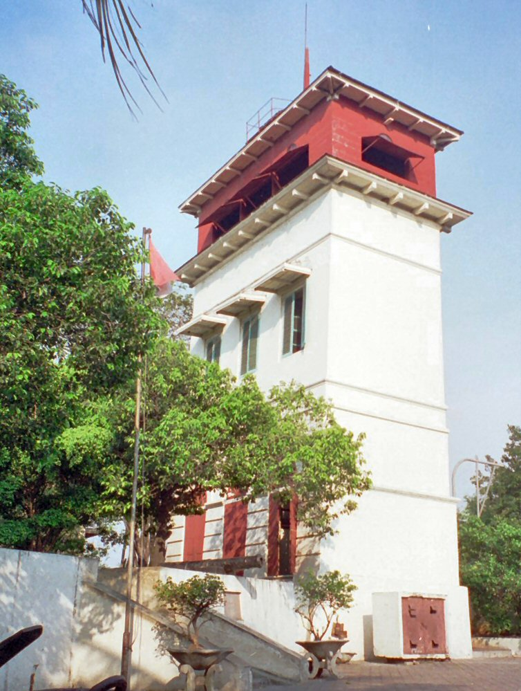 Watchtower in Sunda Kelapa